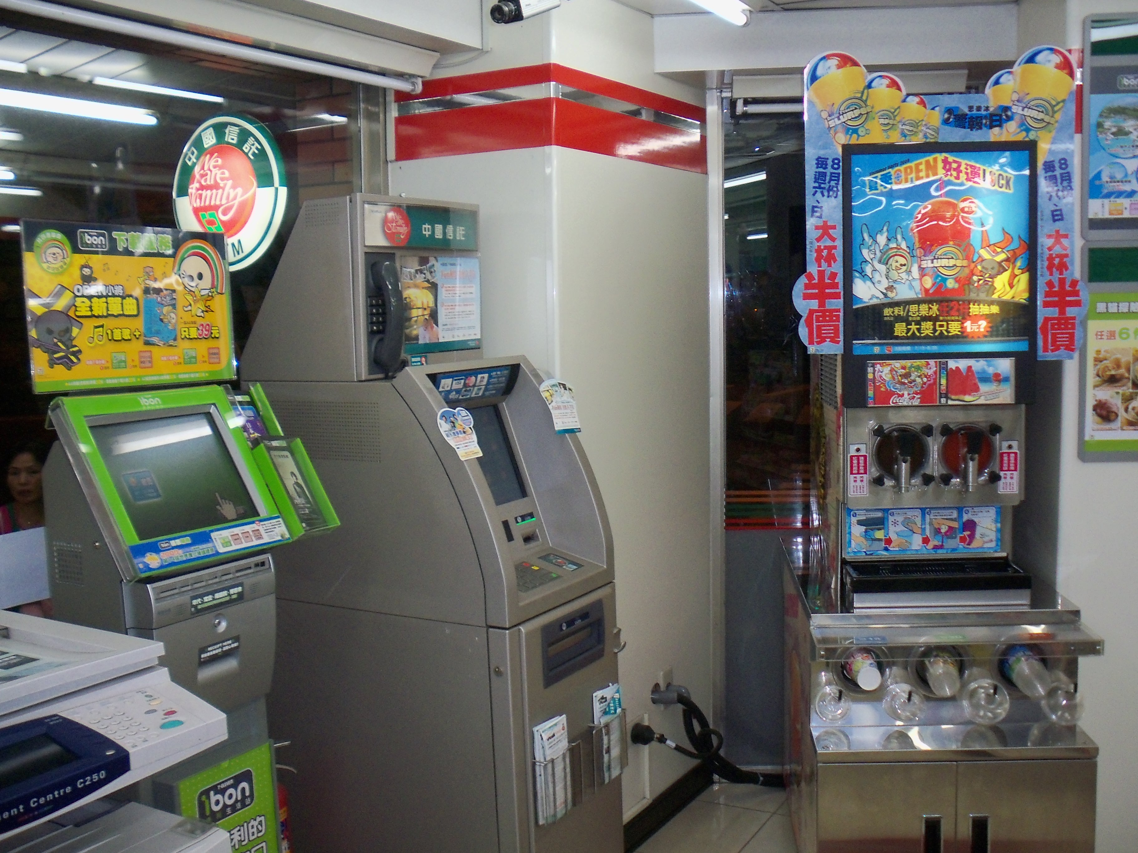 臺北市松山區撫遠街306號，統一超商福源門市（現已遷移）店內一角的思樂冰機、中國信託商業銀行ATM、ibon購票系統與影印機。